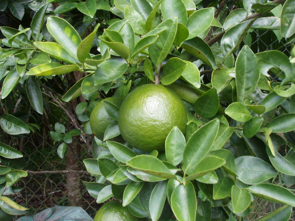 Cam sành